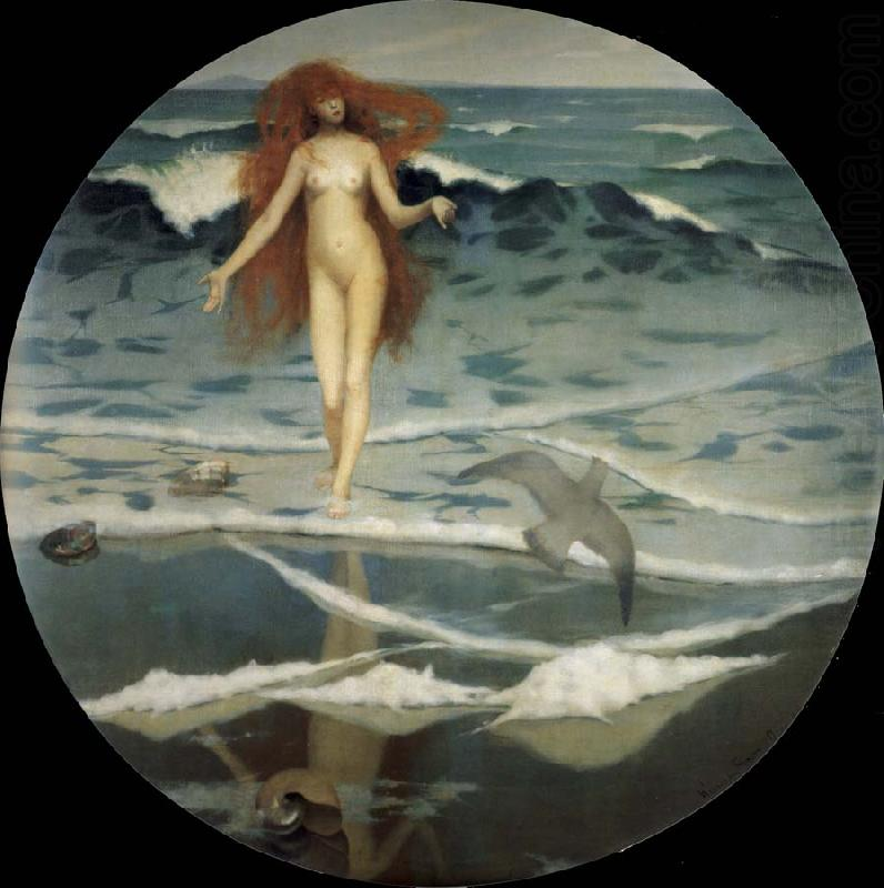 William Stott of Oldham. The Birth of Venus, mk142 1887, Oil on canvas, 187.9 x1 87.9 cm. Oil Painting ID::. 39014